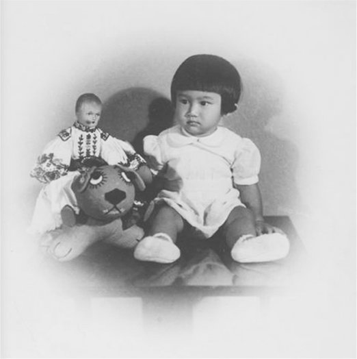 Long nhan đức Thái tử Bảo Long năm 1936.